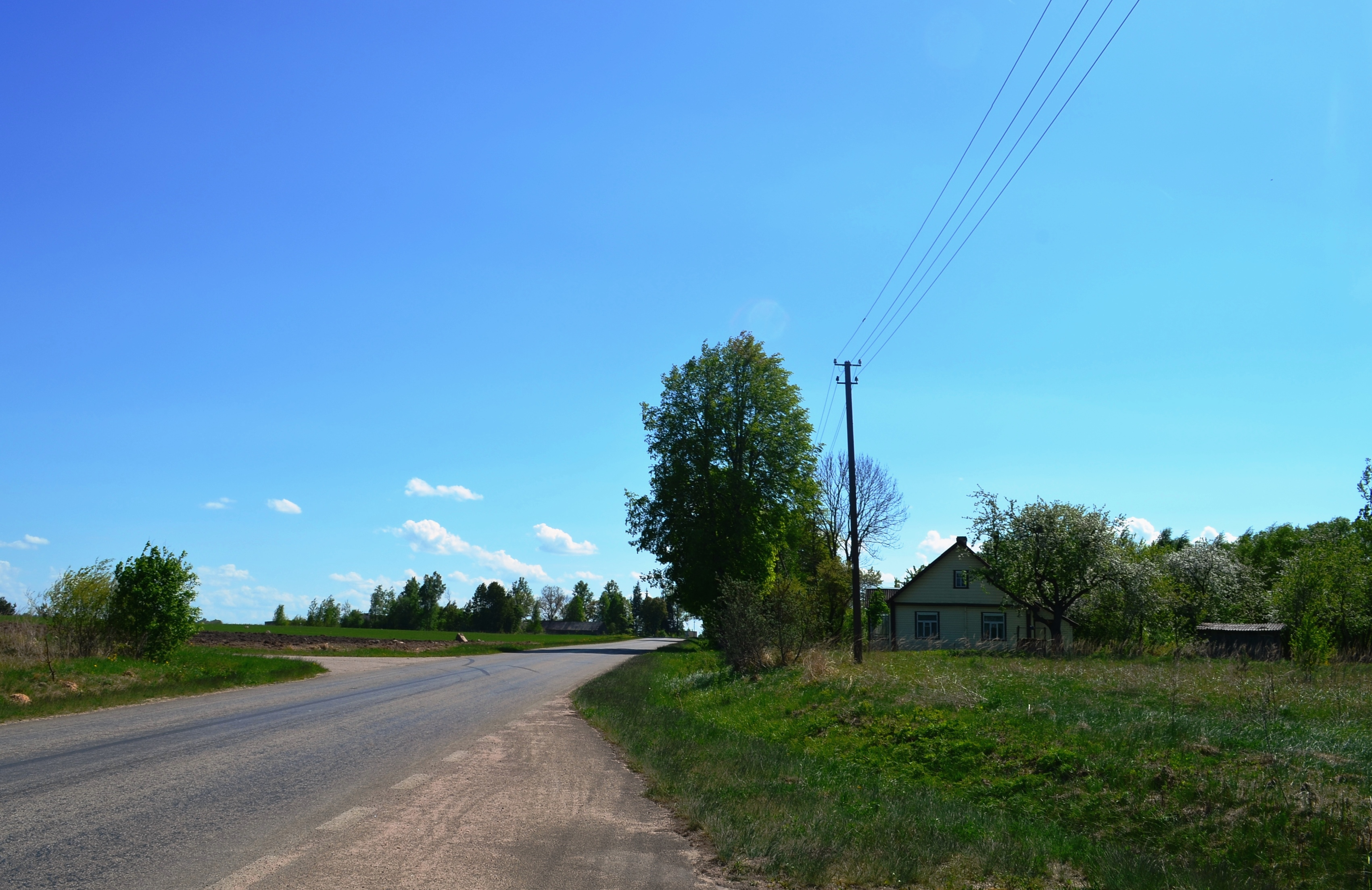 Paberžė, Kavarsko sen., Anykščių raj.